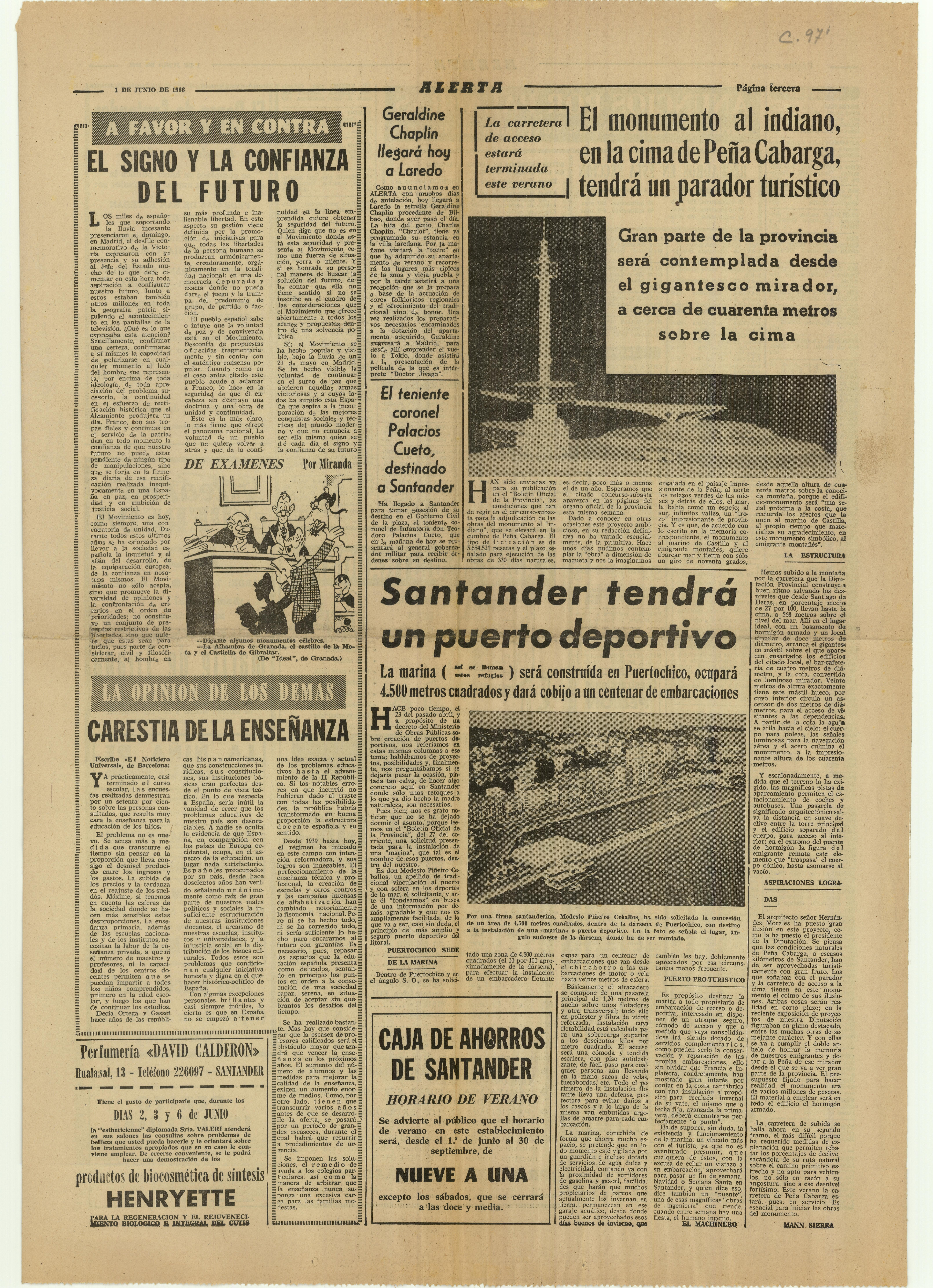 Diario Alerta 01.06.1966